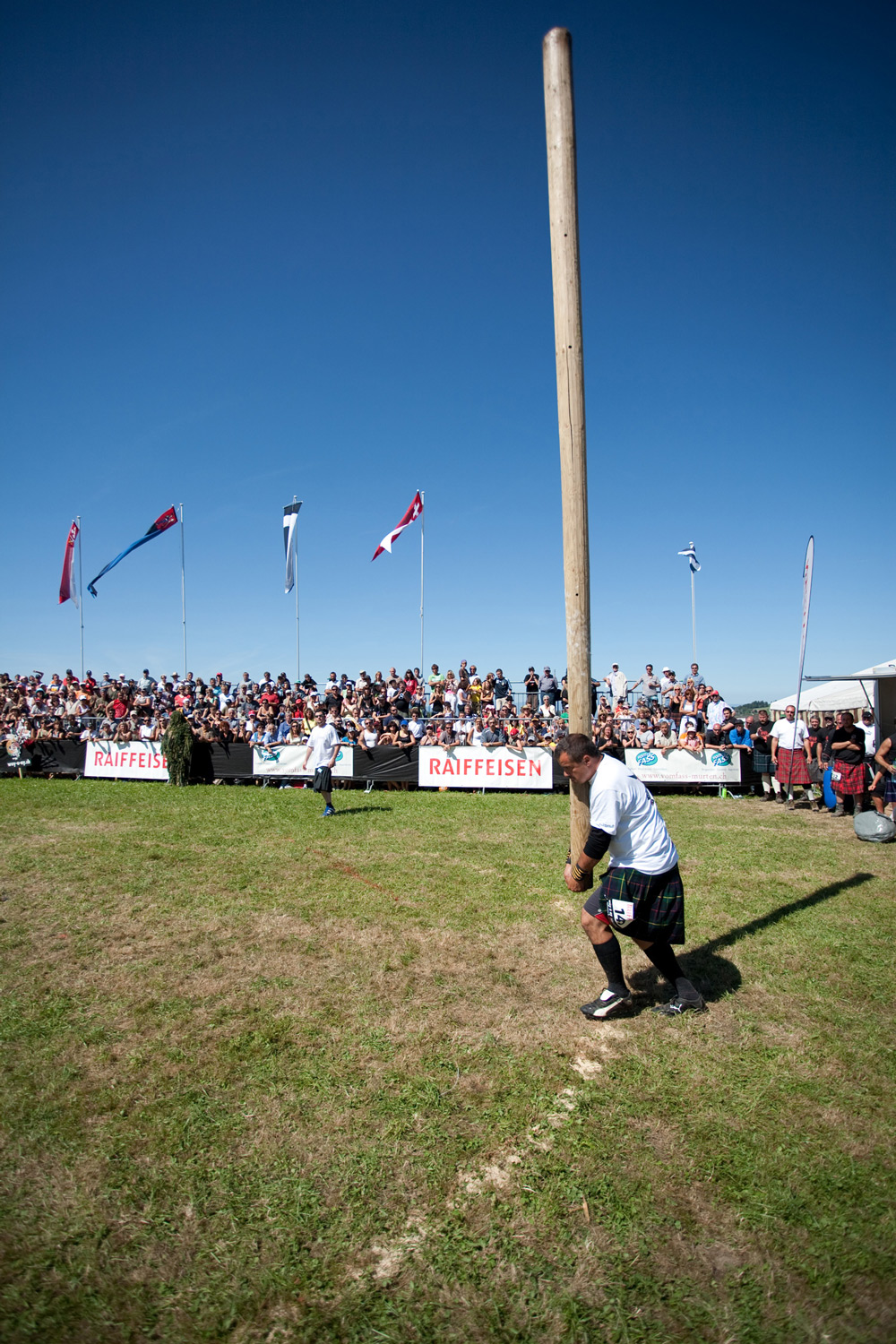 «wùy ù ay» Highland Games Schweizer Meisterschaften 2009 - Baumstammwerfen